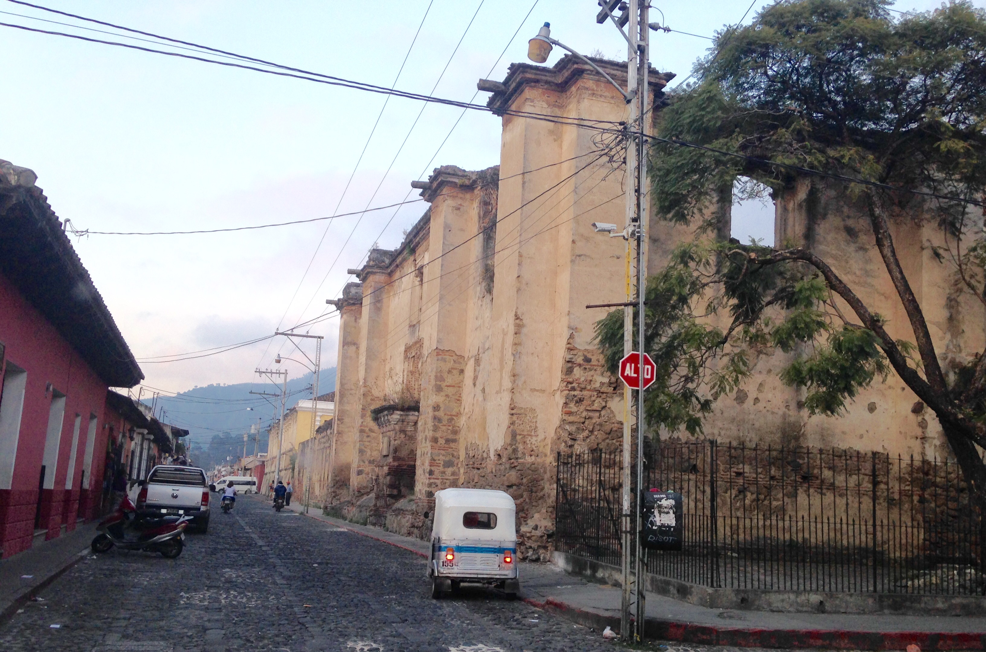 Vista parcial de las ruinas de la Iglesia de la Compañía de Jesús en dicembre de 2015.